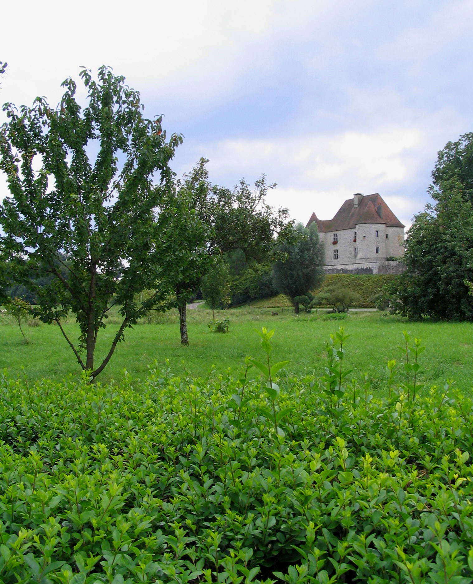 Château de Mutigney - Jura - France